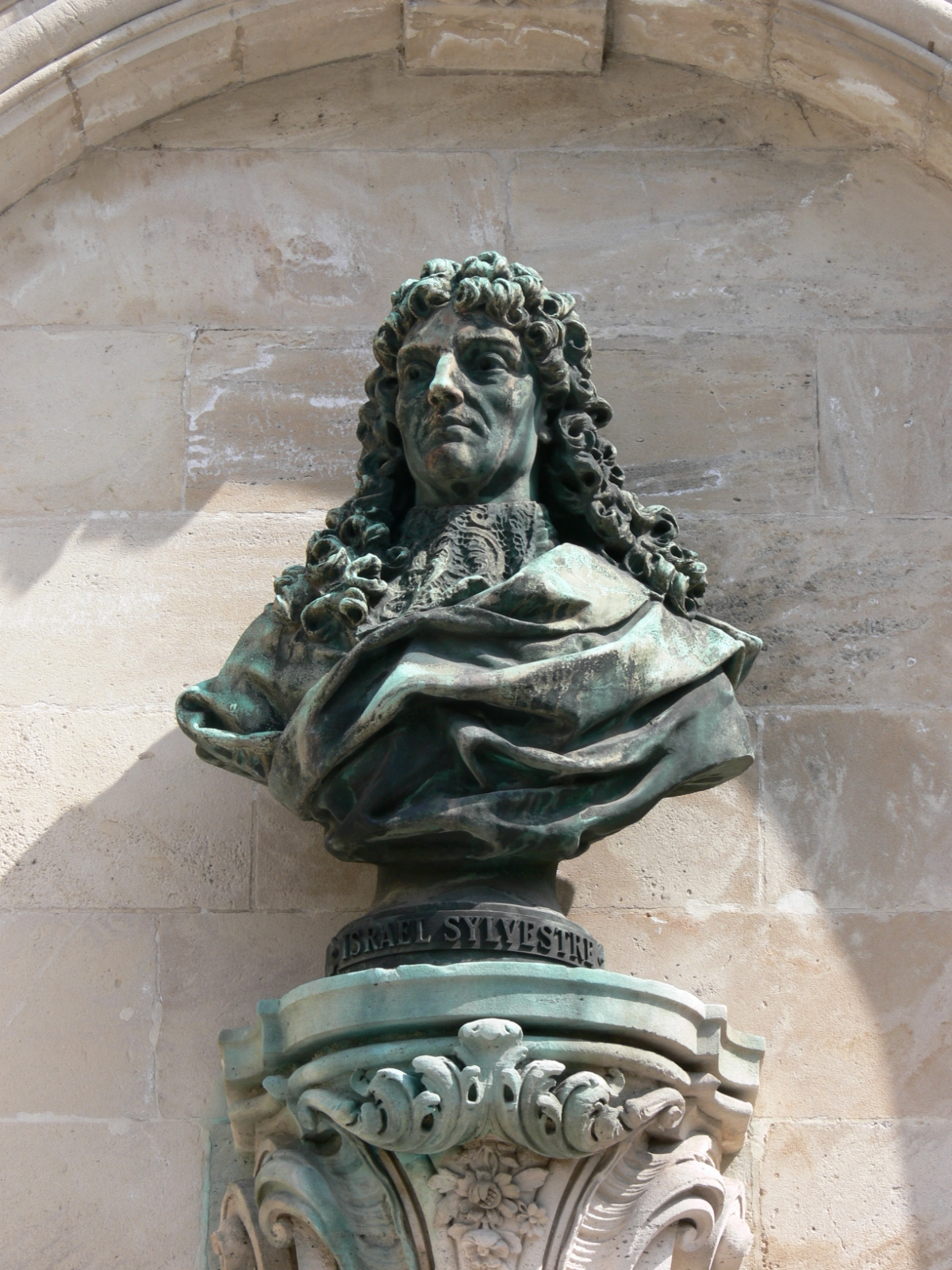 Charles Pêtre (Français, 1828-1907) : Buste du dessinateur Israël Silvestre, bronze, 1881, place Vaudémont à Nancy, Lorraine, France.